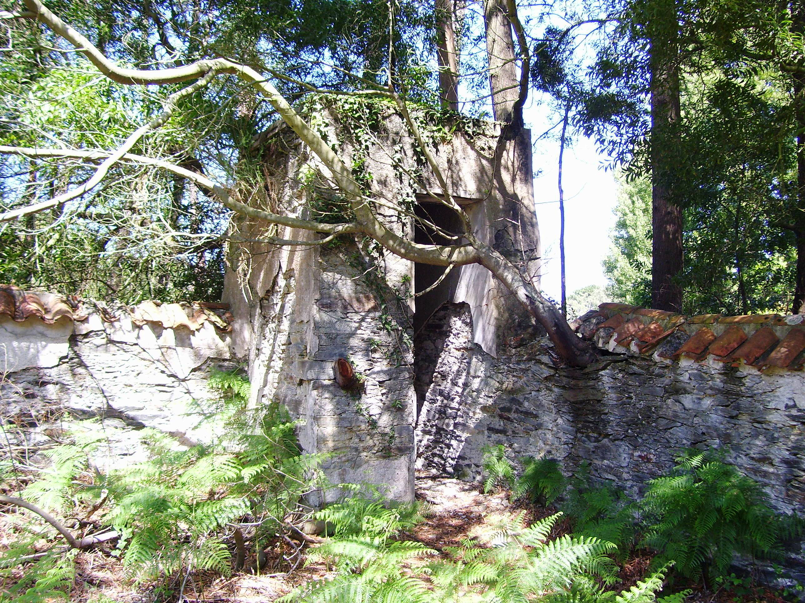 Una de las garitas interiores. El cementerio "moro" o musulmán de Barcia, en el concejo de Valdés, fue construido en 1936 para enterrar a los soldados regulares de Marruecos que fueron forzados a combatir en el bando de los militares alzados contra la República, durante la Guerra Civil Española. Los marroquíes fueron utilizados como carne de cañón durante la batalla de El Escamplero, en la ofensiva a Oviedo. No hay cifras exactas del número de musulmanes que fueron enterrados en él; aunque algunas fuentes hablan de unas 300 tumbas. El cementerio tiene cerca de 4.000 m2.